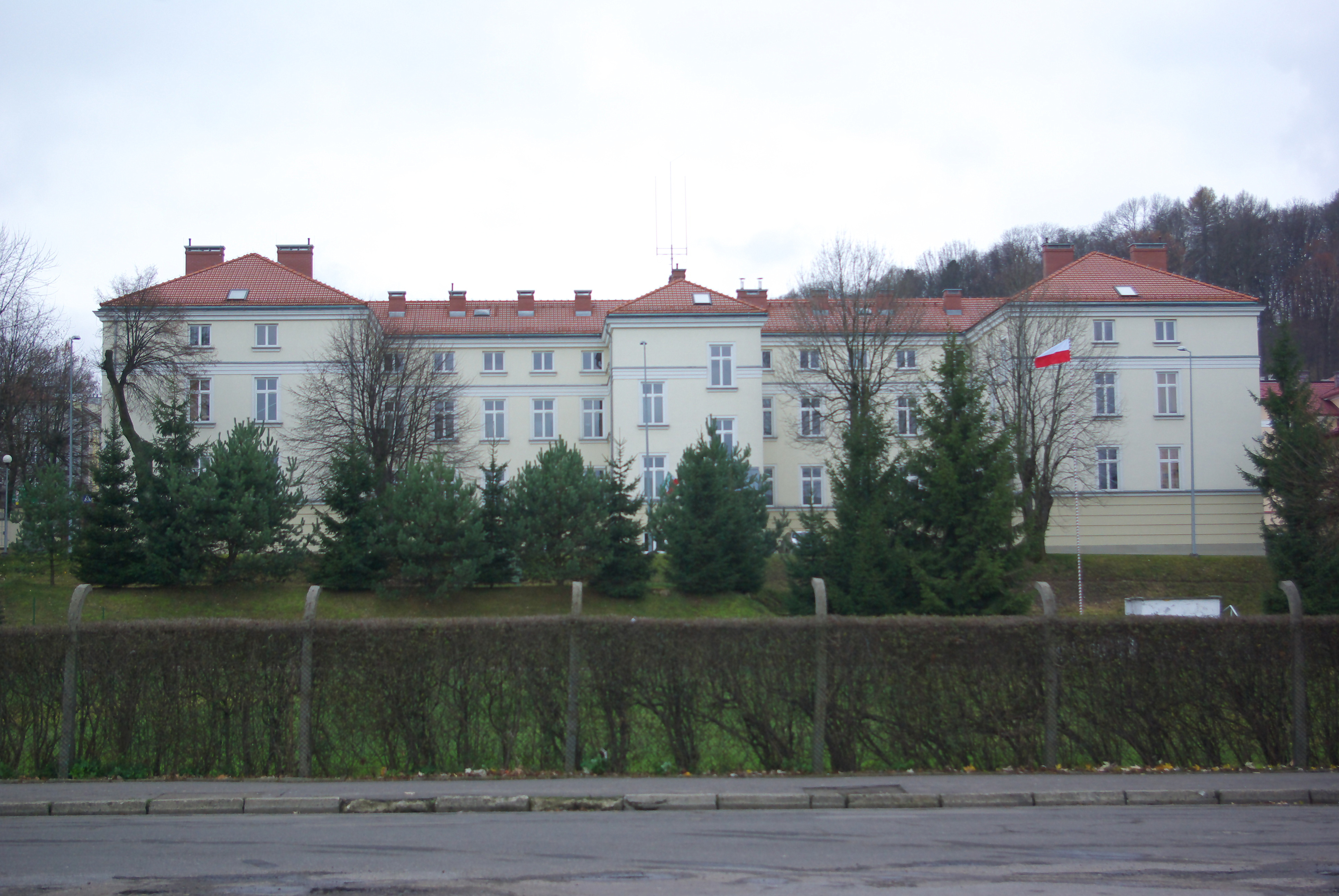 Budynek przy ul. Mickiewicza 23 w Sanoku.